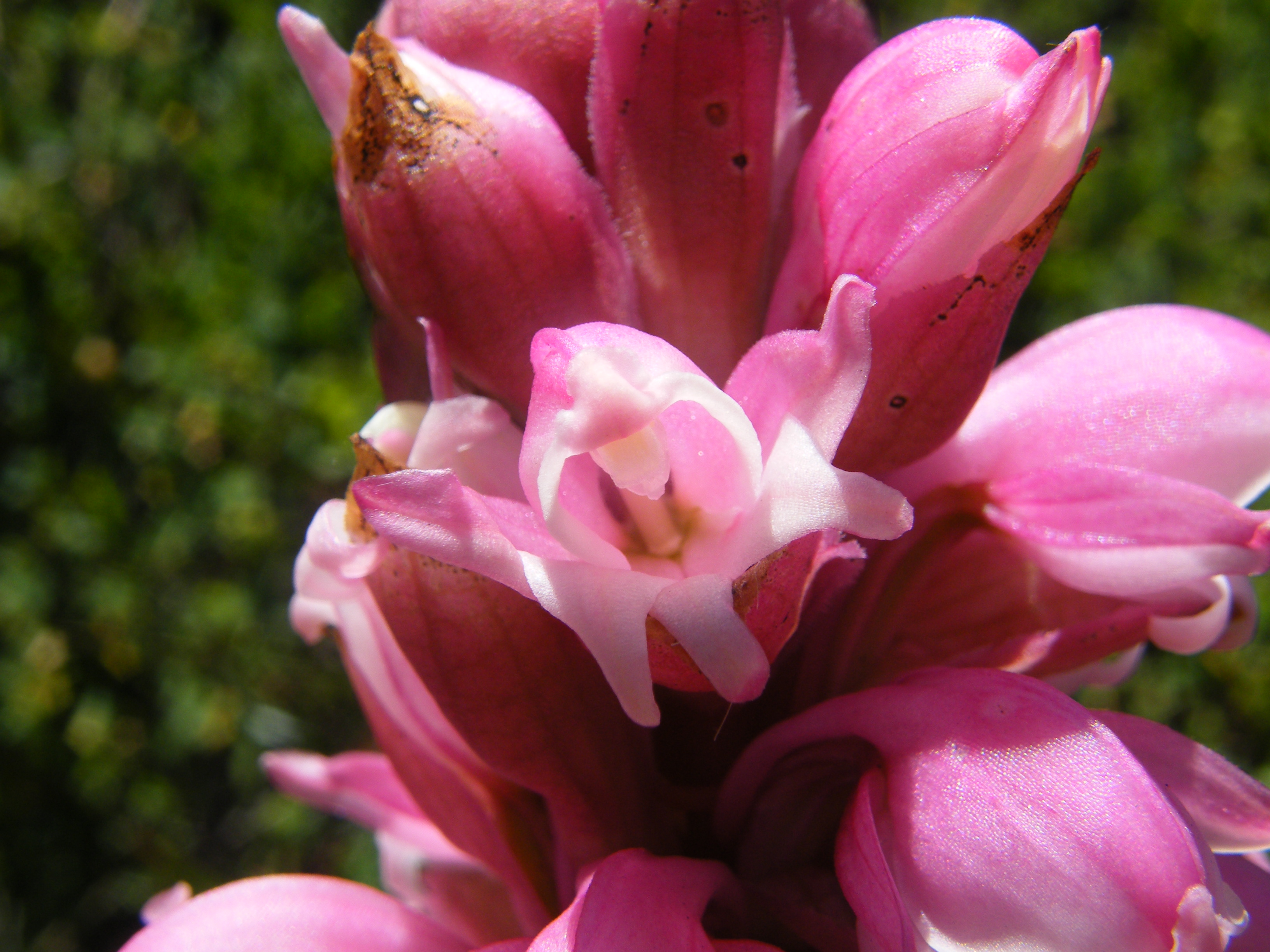 Rooikappie